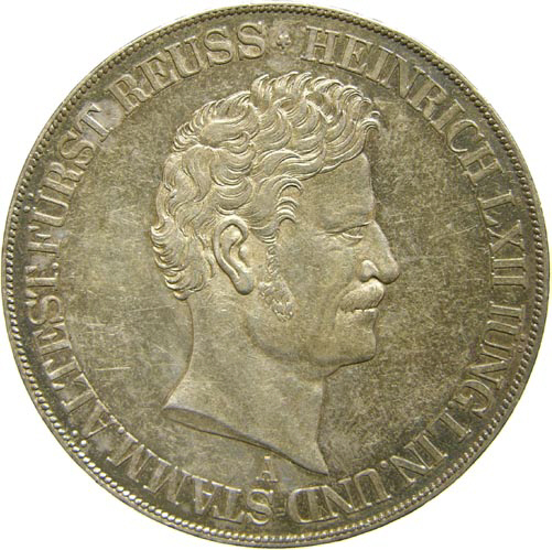 Heinrich LXII.. Münzporträt auf einem Vereinstaler aus dem Jahre 1853.